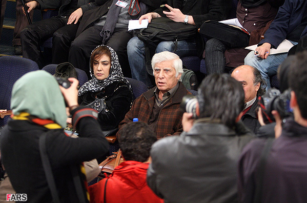 در نشست خبری فیلم وقتی همه خوابیم، بیست و هفتمین دوره‌ی جشنواره‌ی فیلم فجر